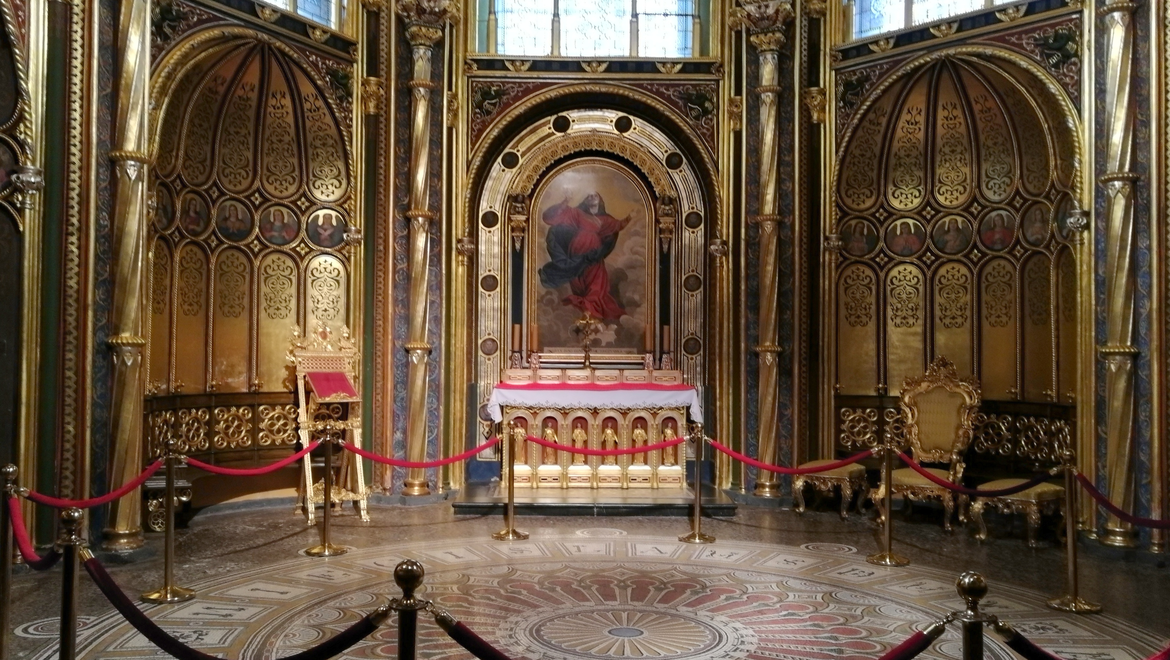 Poznaňská katedrála - Zlatá kaple (Polských králů)